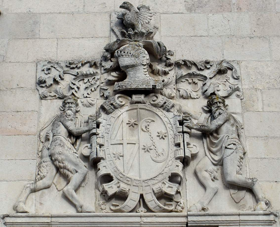 Casa Bustamante, armas de los Zumalburu y Vicuña (Salvatierra de Álava)